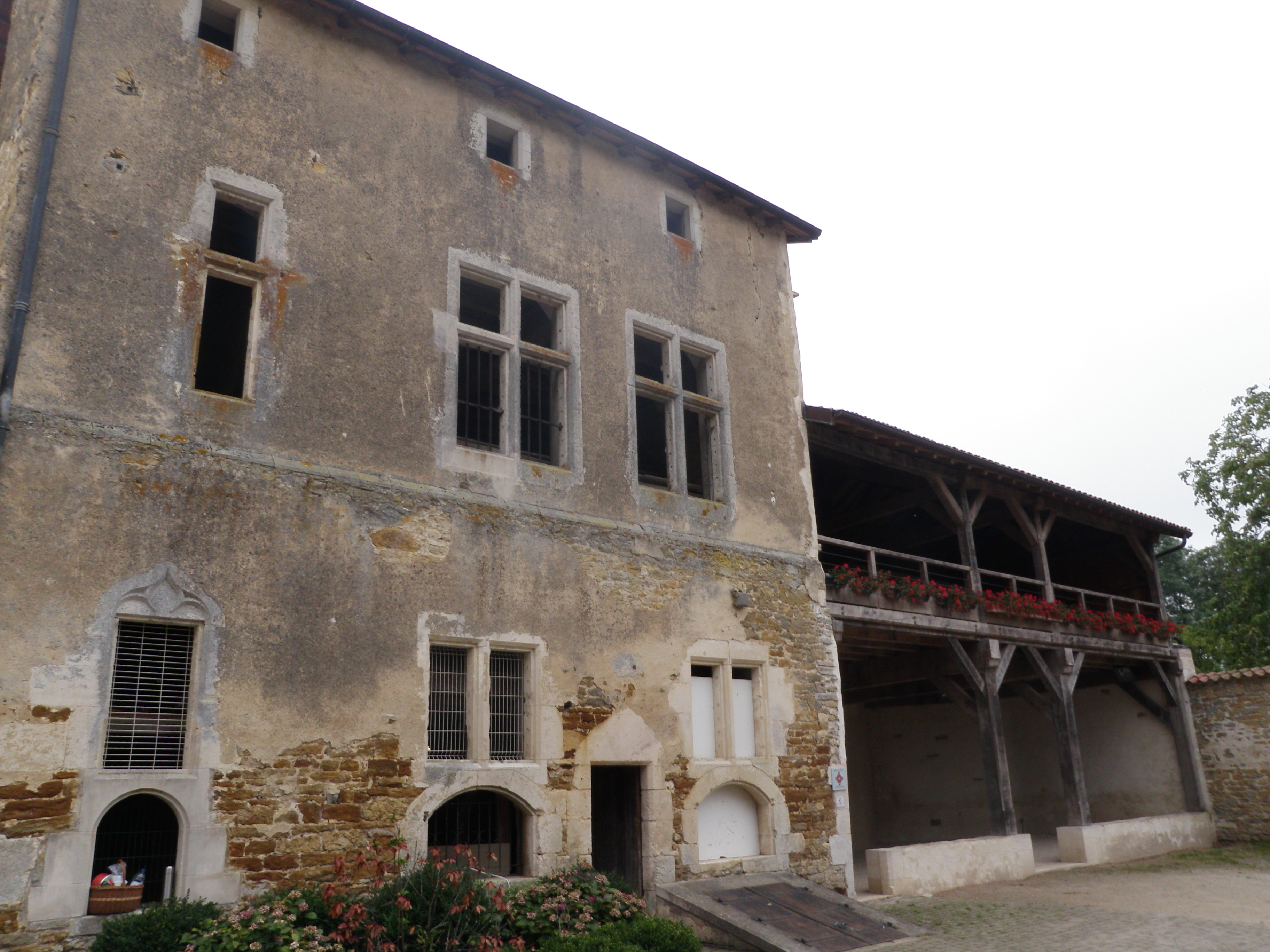 Bâtiment renaissance